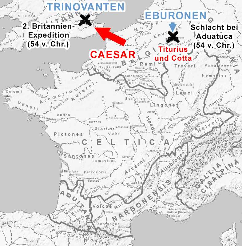 5. Buch De bello Gallico